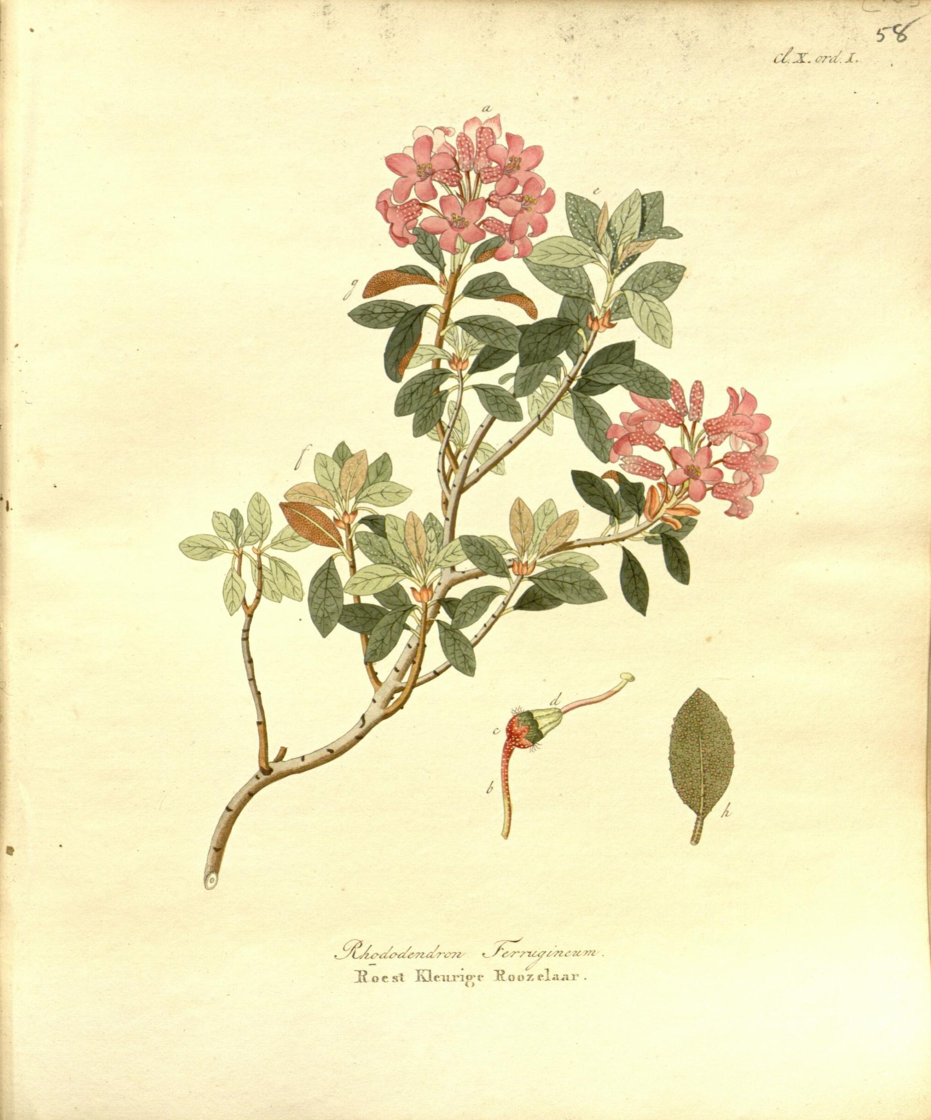 5 C/X. C77t. I ^ r I i • I k^lA^^c^c/c ?t d'. r^c7Z .Rocst Klciijn^;r ^.T*n^i/i n e u 9?i ^ 1 oozej^ii^ii'